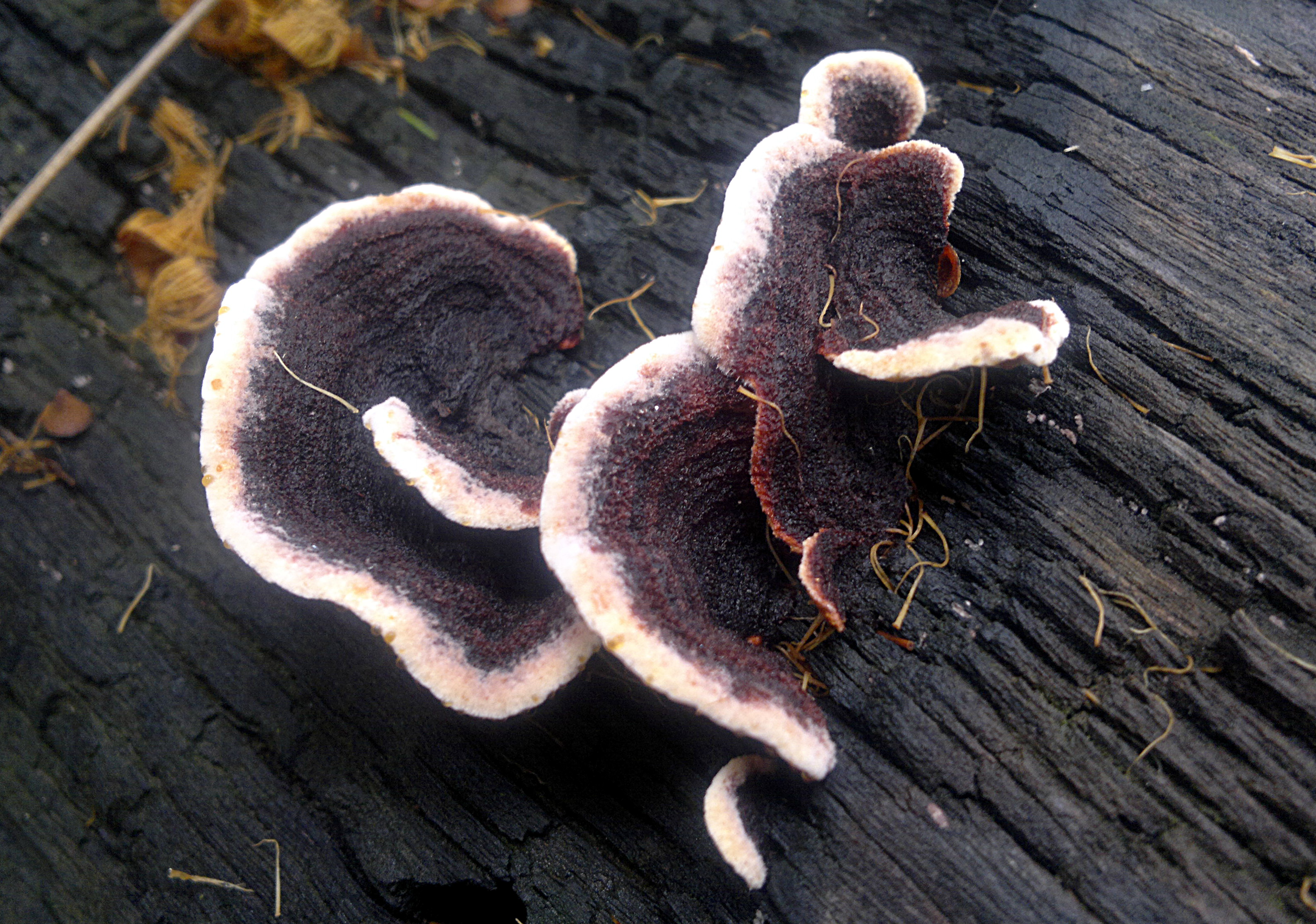 Laxitextum bicolor (Pers.) Lentz